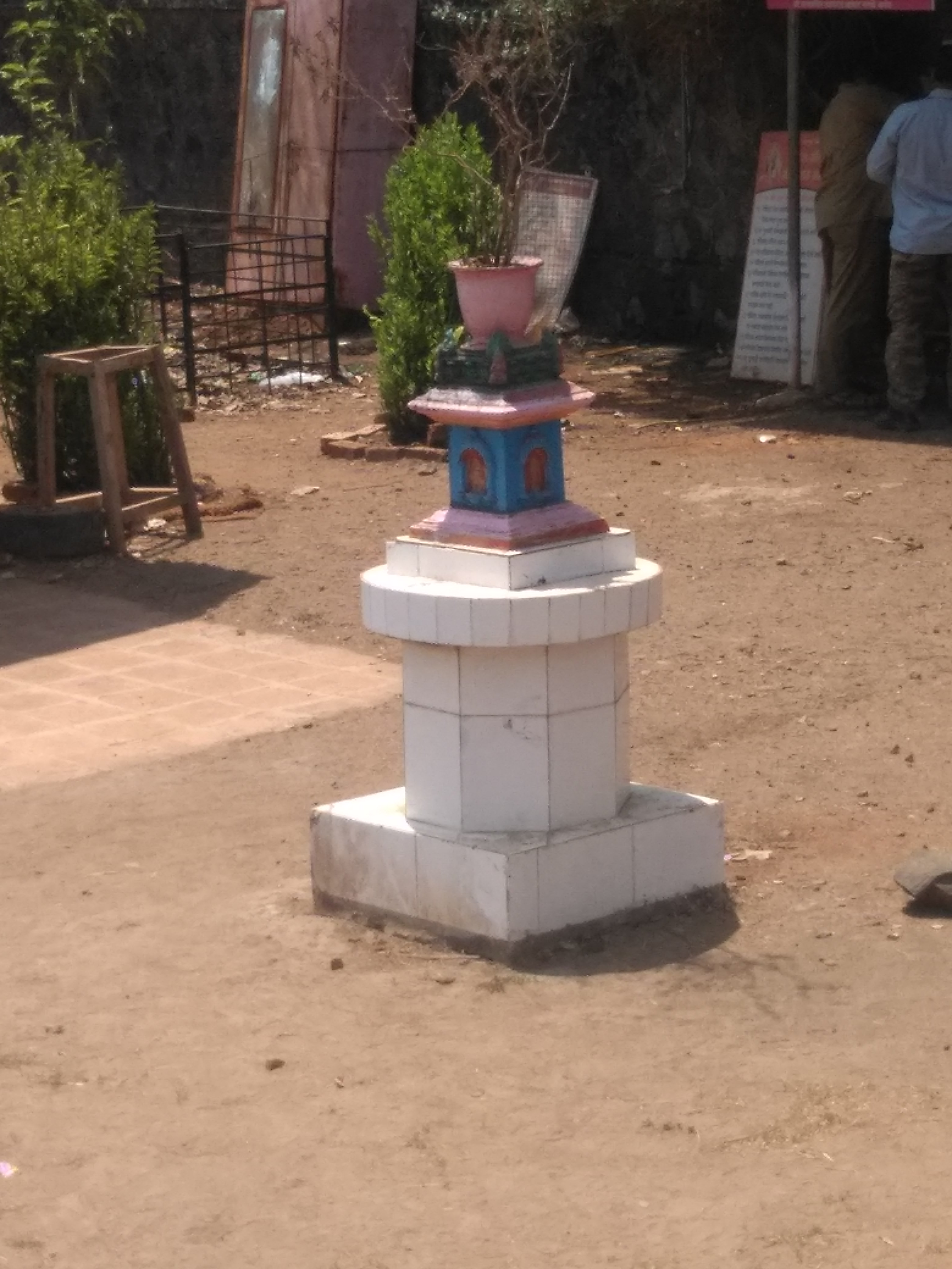 घरासमोरील तुळशी वृंदावन